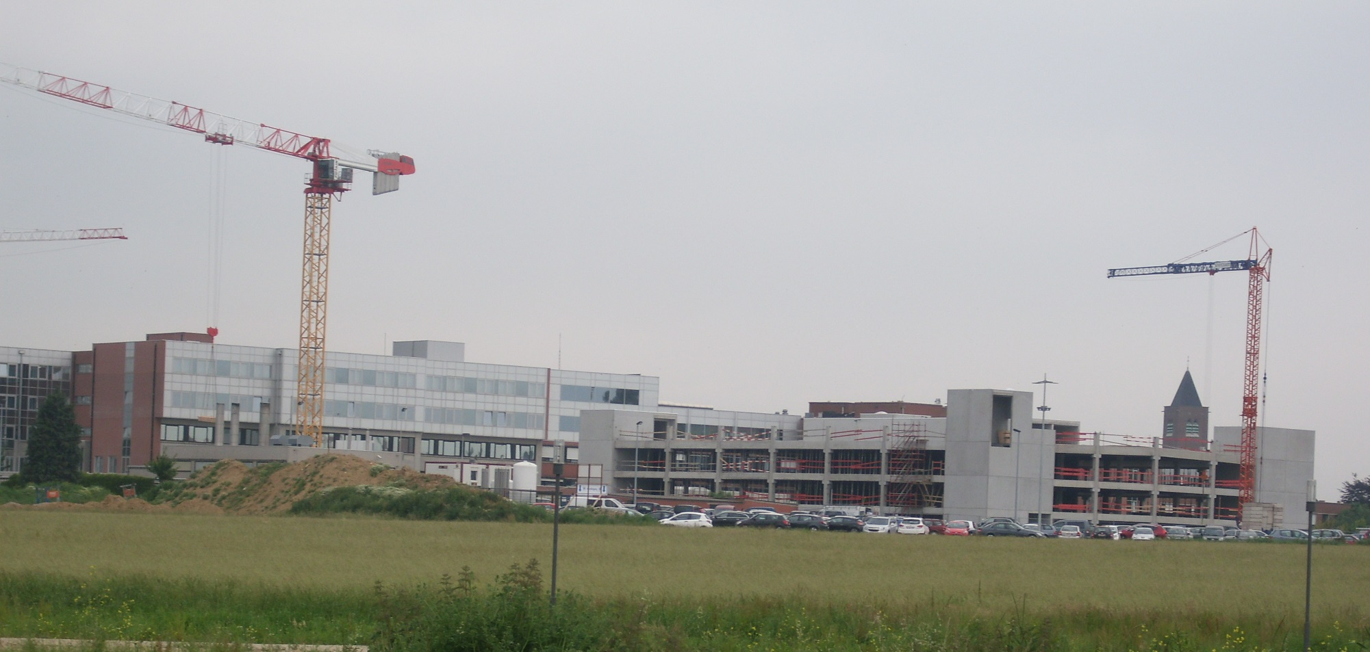 Werken aan het AZ Sint Elisabeth in Zottegem - Oost-Vlaanderen - België